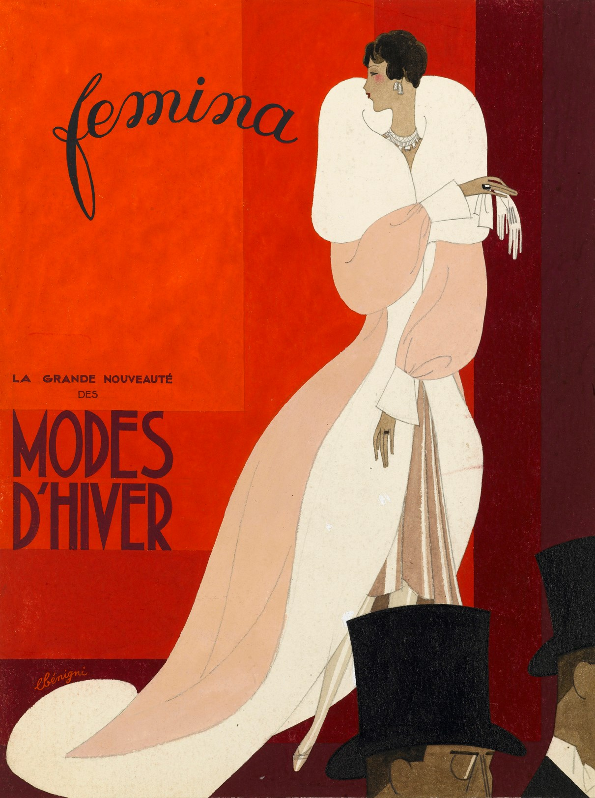 Gouache, links unten signiert und datiert Template:Zitatlbénigni / 1929 Mit Bleistift rückseite beschriftet Bildmaße 330 x 250 mm, Maße des Blattes 370 x 269 mm